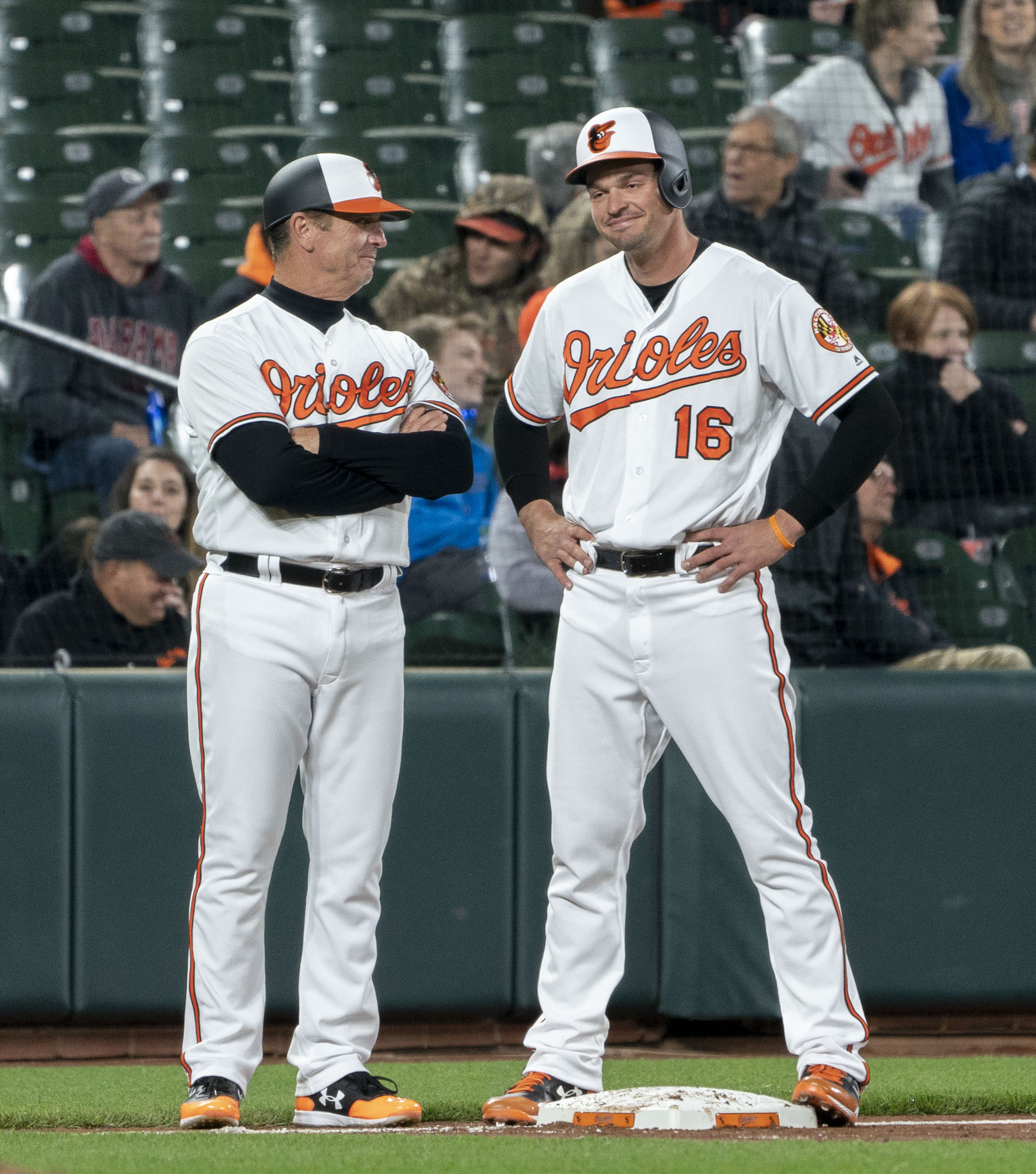 Blue Jays at Orioles 4/11/18